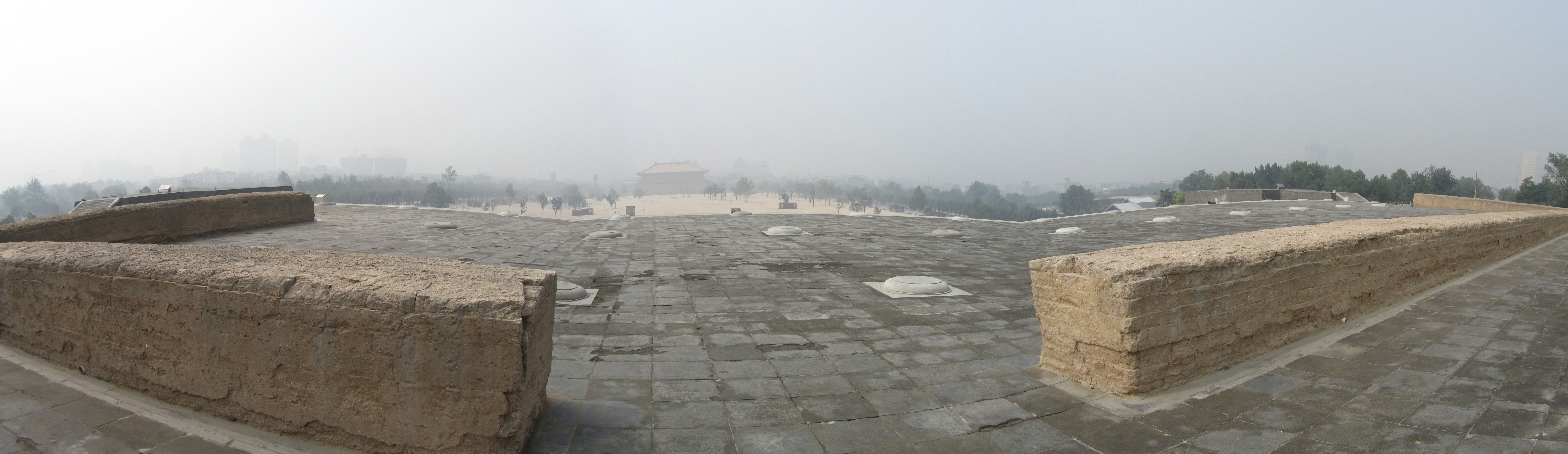 复原后的大明宫含元殿遗址。